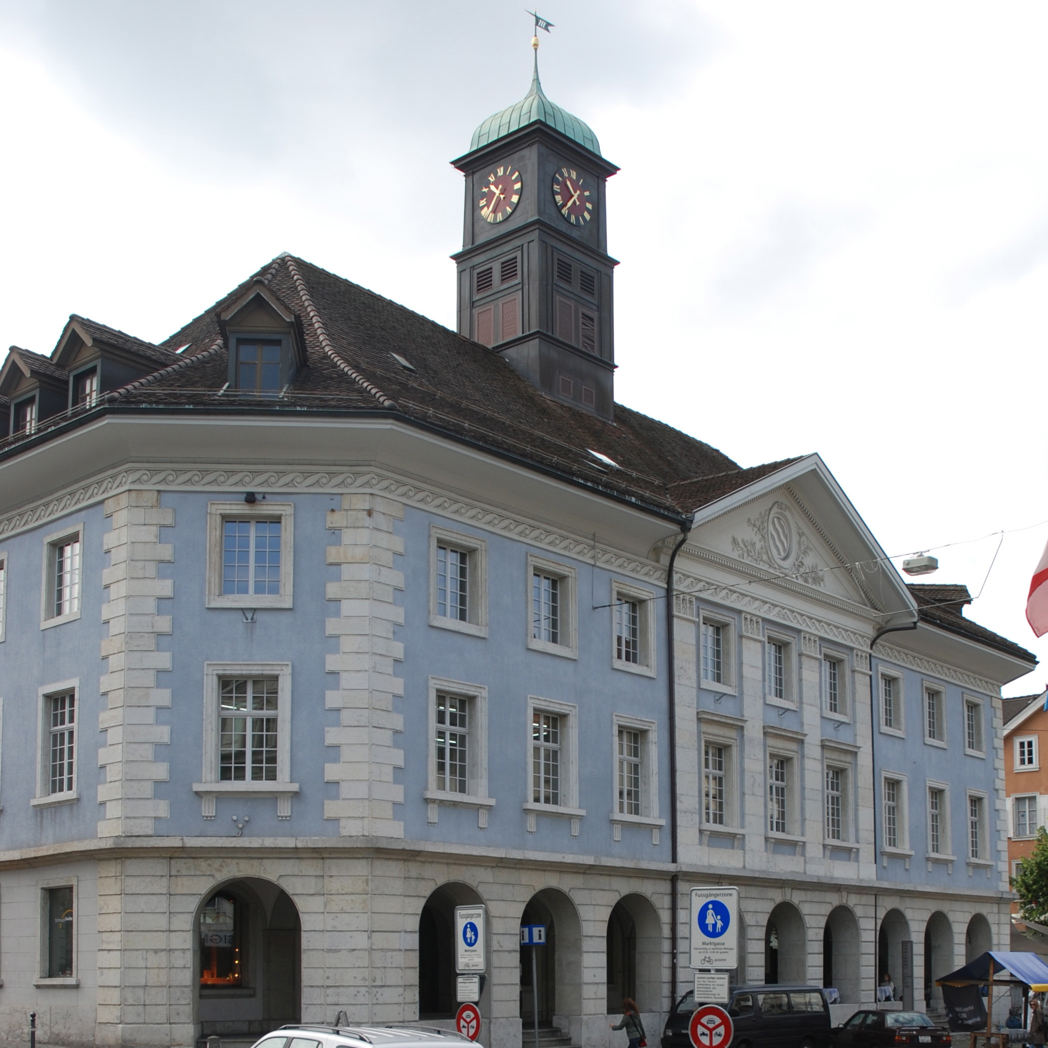 Ansicht des denkmalgeschützten Choufhüsi in Langenthal, Sitz des Kunsthauses Langenthal